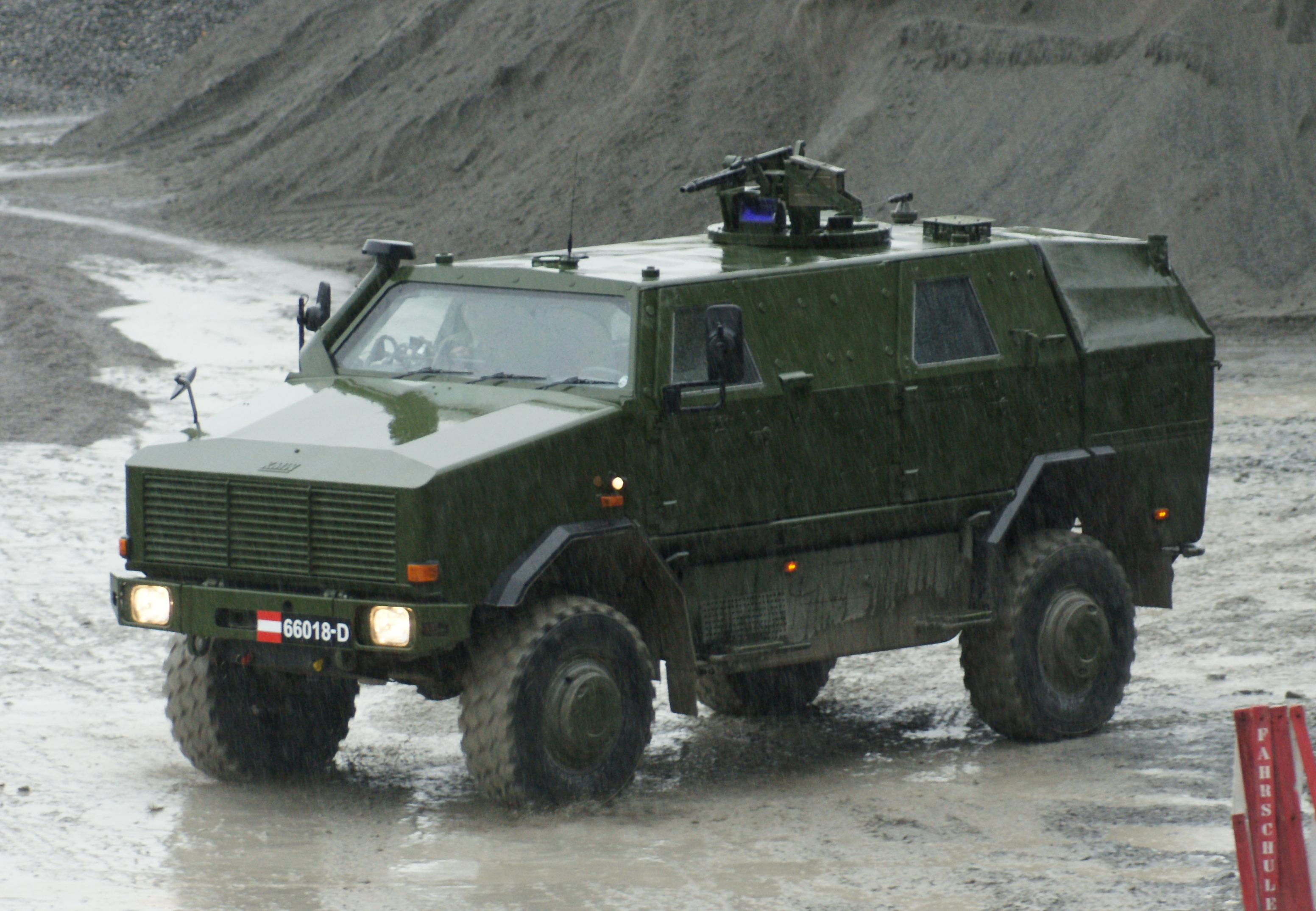 Im Zuge einer Road-Show zeigte das Österreichische Bundesheer im Dornbirner / Hohenemser Steinbruch das Allschutz-Transport-Fahrzeug (ATF) Dingo 2. Es ist ein gepanzertes, minengeschütztes, luftverladbares, leicht bewaffnetes Radfahrzeug.